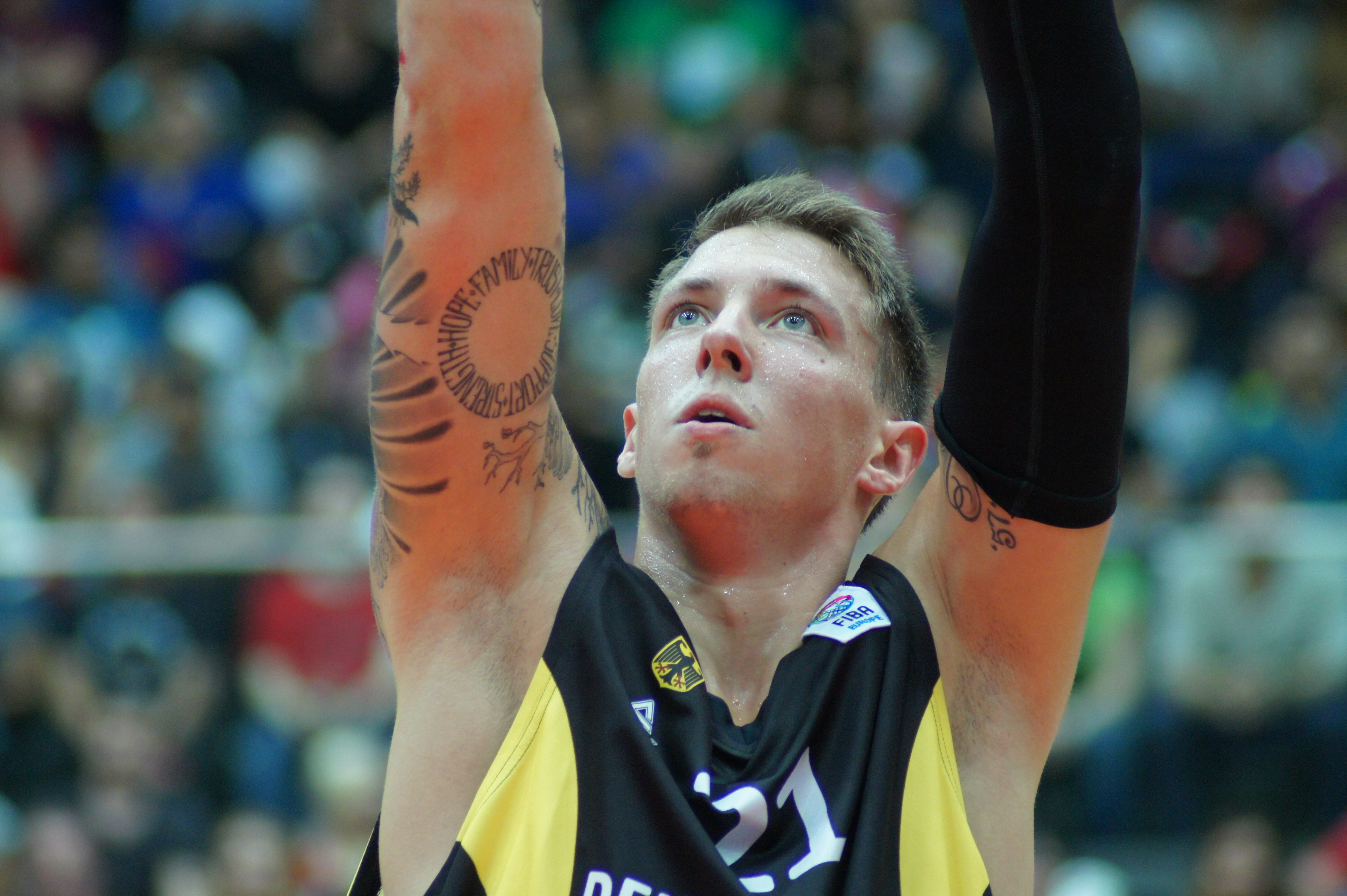 Qualifikationsspiel EuroBasket Österreich - Deutschland, 13. August 2014 im Multiversum Schwechat.